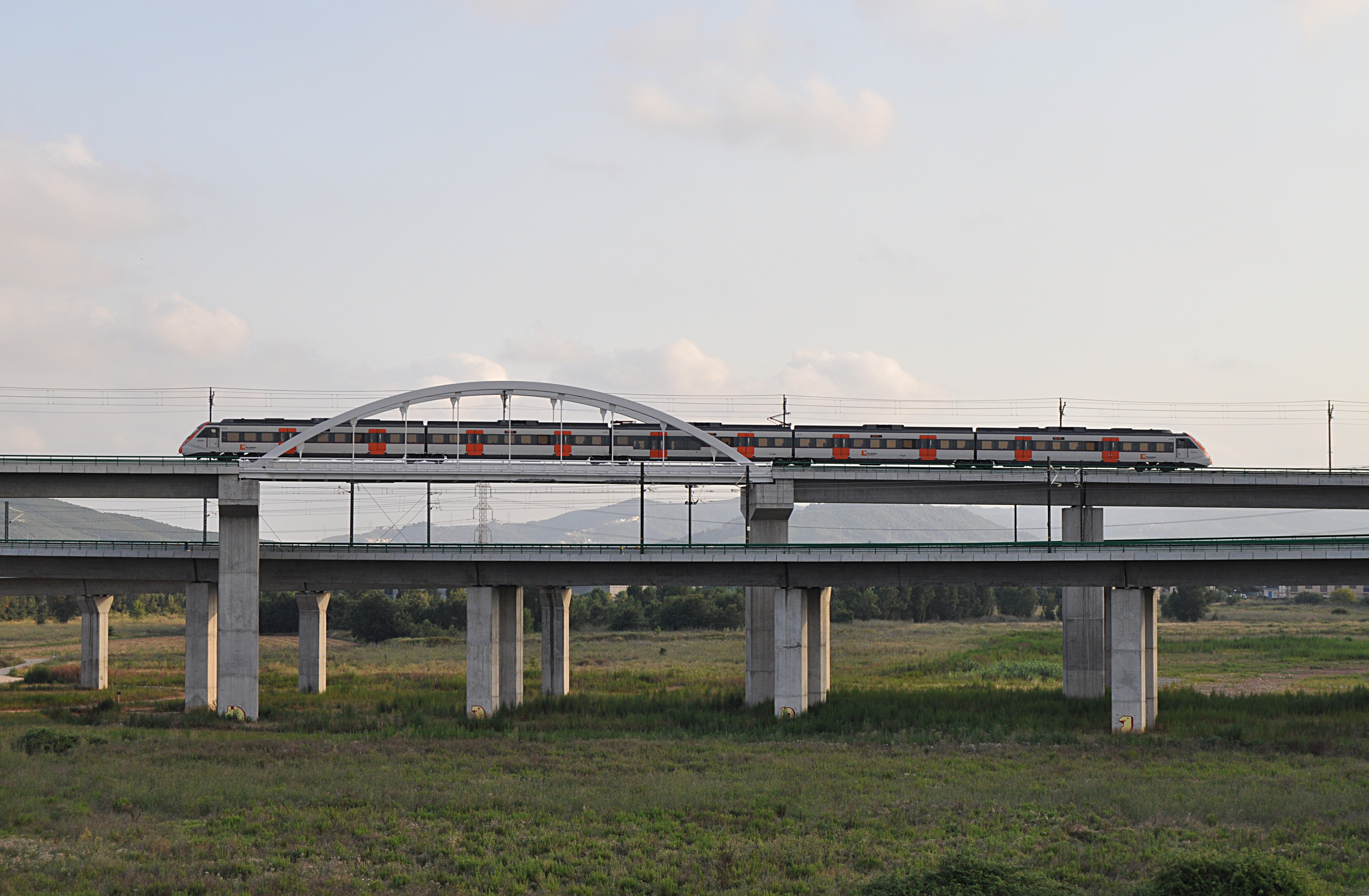 Un automotor eléctrico Civia 465, que realiza un servicio R8 de Rodalies de Catalunya a Granollers Centre, entra en el enlace del Nudo de Mollet que une la línea 246 Castellbisbal - Mollet-Sant Fost y la estación de Mollet-Sant Fost.